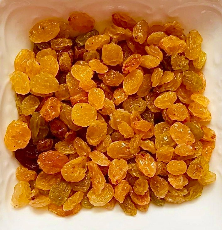 صورة لصحن عنب مجفف أول ما يطلق عليه